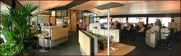 Deze foto staat met dezelfde afmetingen ook op Overzicht van een meldkamer anno 2005. Ambulance, Brandweer en Politie zitten bij elkaar. Afbeeldingen gemaakt in opdracht van RAV Limburg Noord die hiervoor de rechten heeft overgenomen. Ben zelf Algemeen Directeur van deze organisatie. lucien 15 okt 2005 23:14 (CEST)